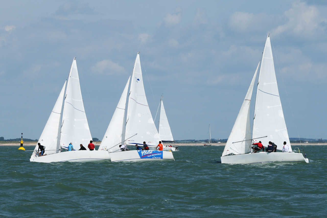 Preparation de tangon de spi